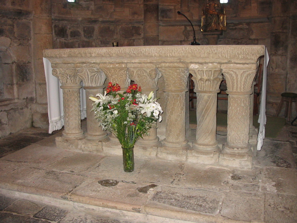 Colegiata de San Salvador de Cantamuda, Palencia, España. Altar.